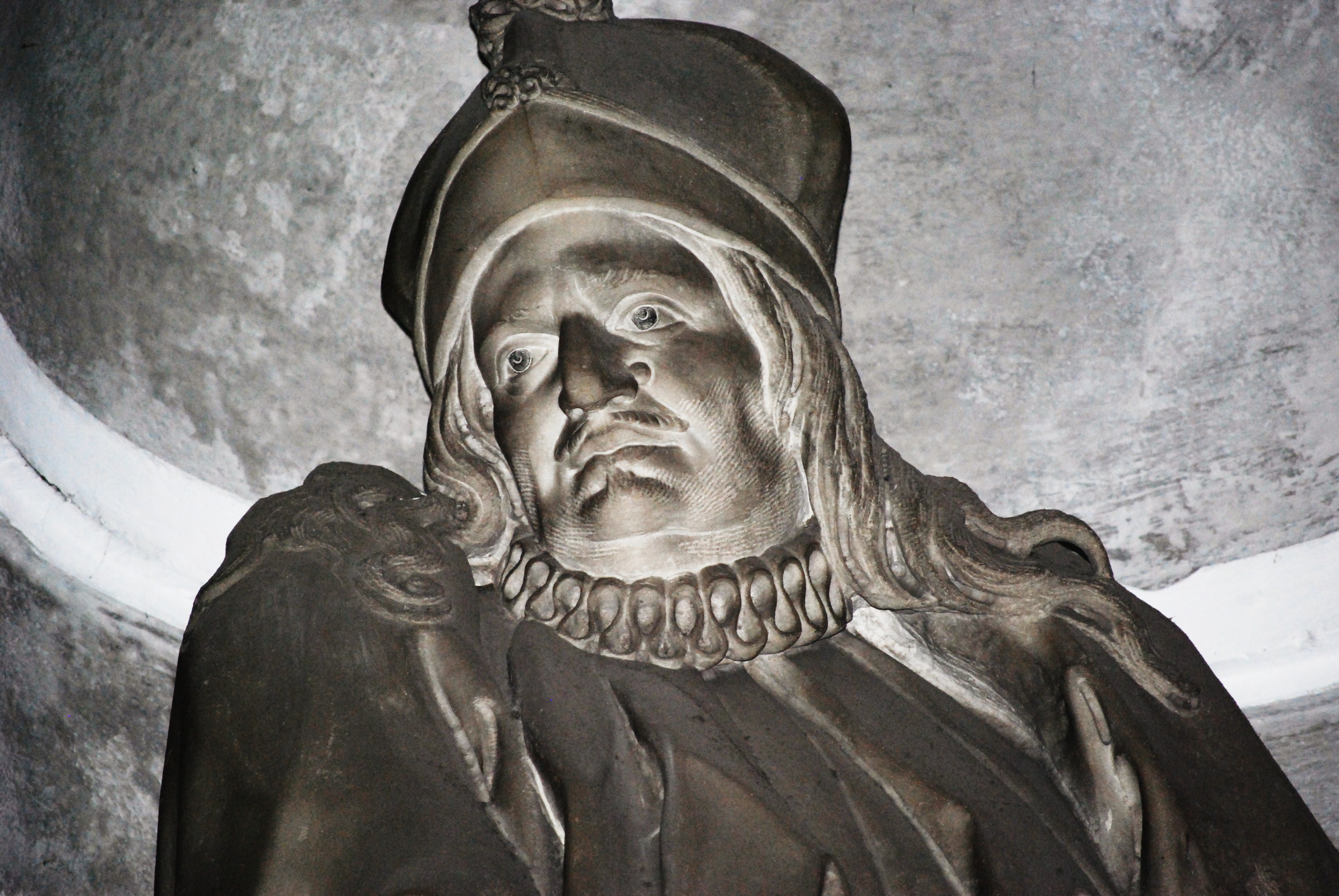 Statua di Giannettino Odone situata a Genova, Albergo dei Poveri, antichiesa